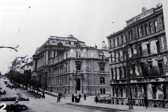 Фотографије бомбардованог Београда 06. 04. 1941. и улазак окупатора у Београд априла 1941.